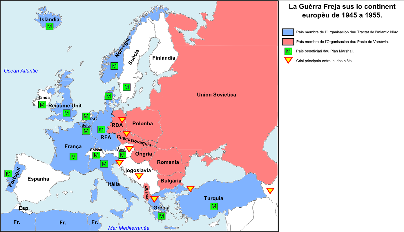 Guèrra Freja en Euròpa de 1945 a 1955